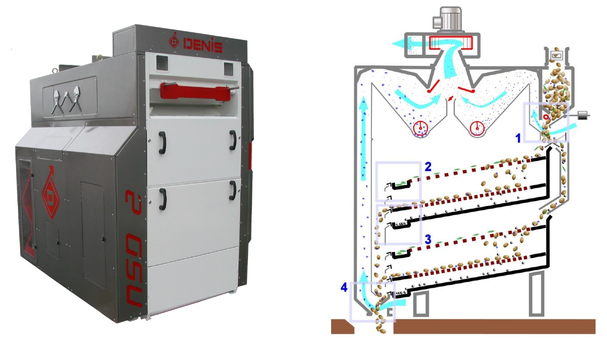 Схема принципа работы воздушно-решётного сепаратора